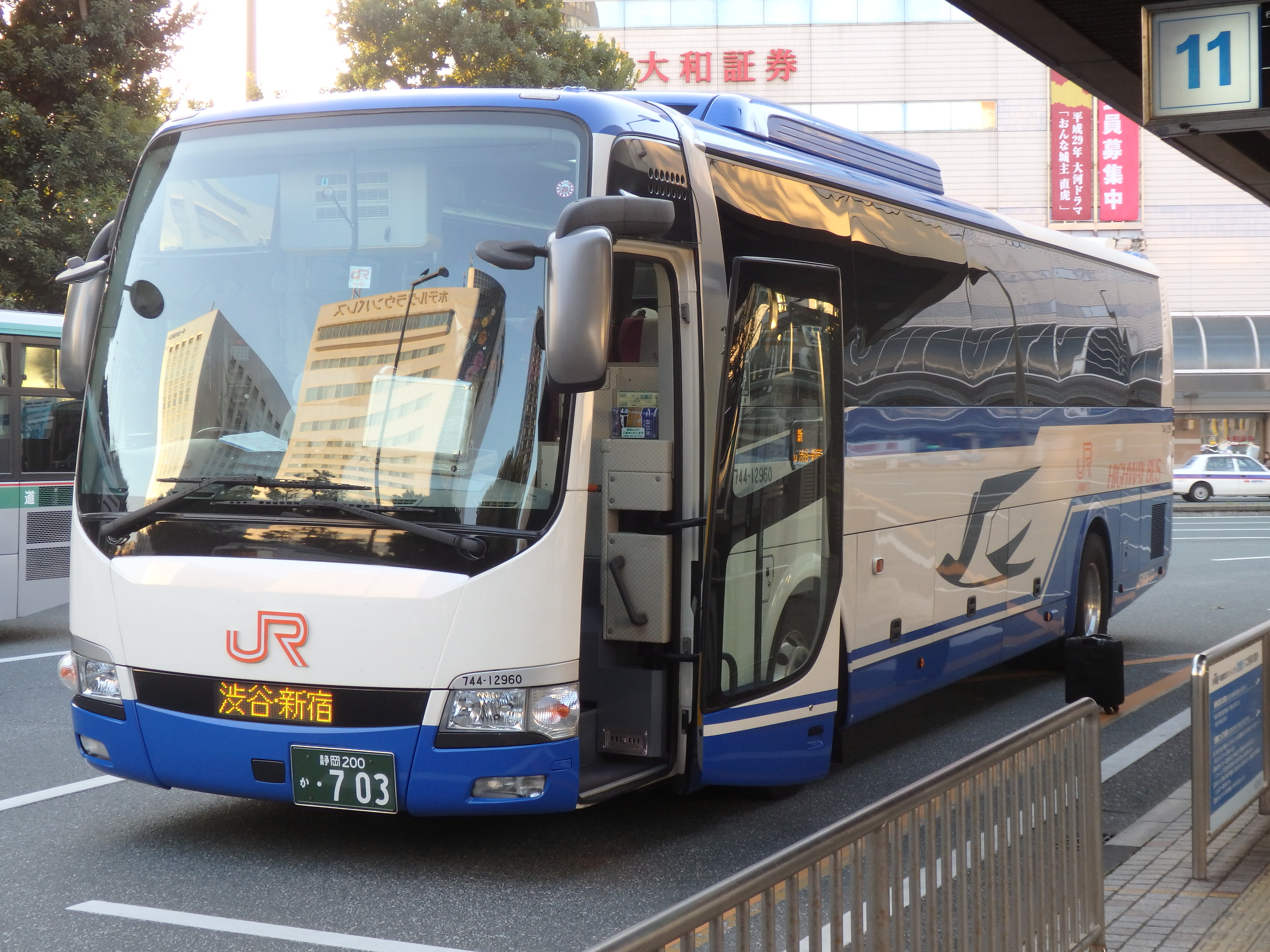 渋谷・新宿ライナー浜松号JR東海バス担当便現行車両の一例